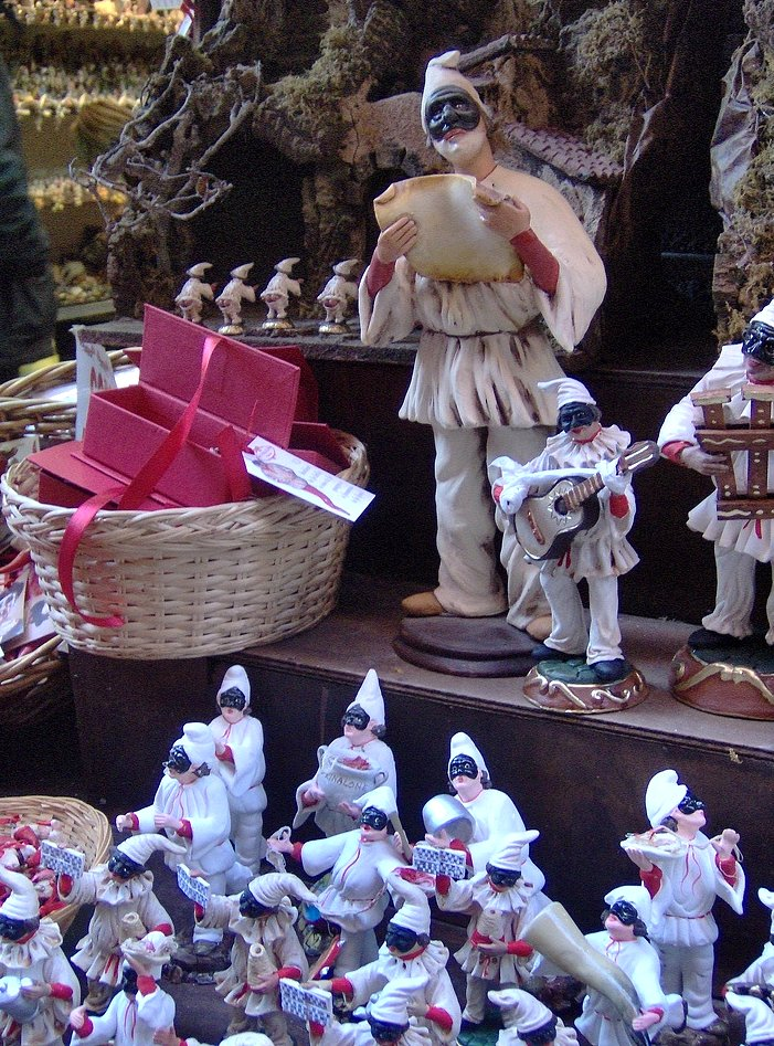 Pulcinella in via San Gregorio Armeno, Napoli - Italia